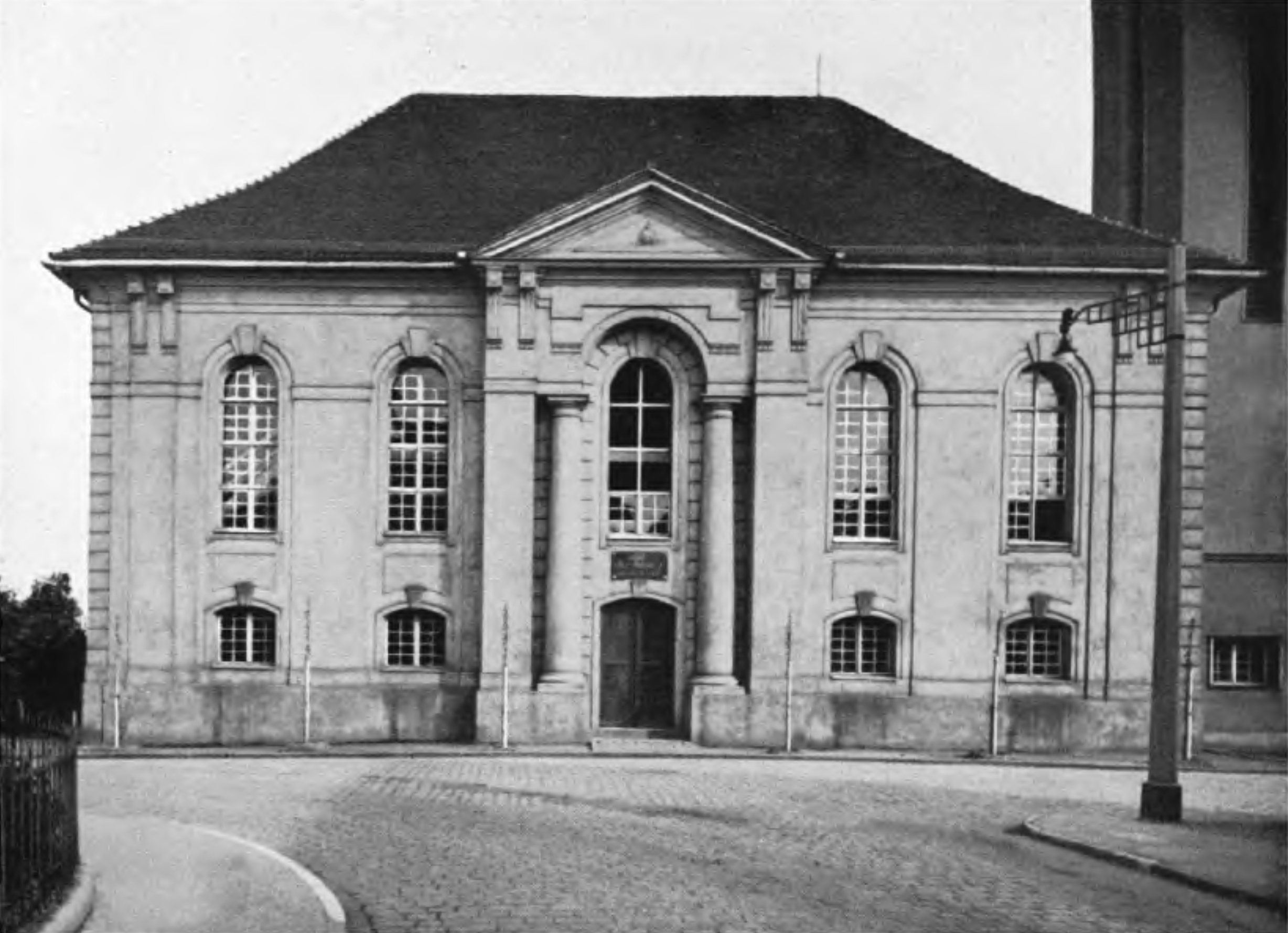 kościół garnizonowy w Koźlu, rozebrany